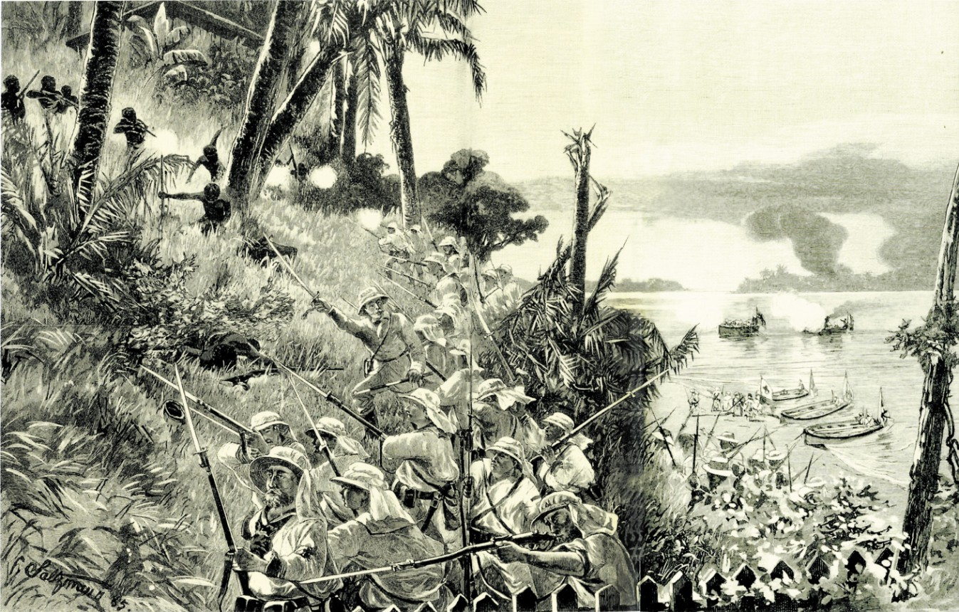 Kamerun 1884: Angriff der detuschen Kriegsschiffe Bismarck und Olga auf Lock Prisos Dorf